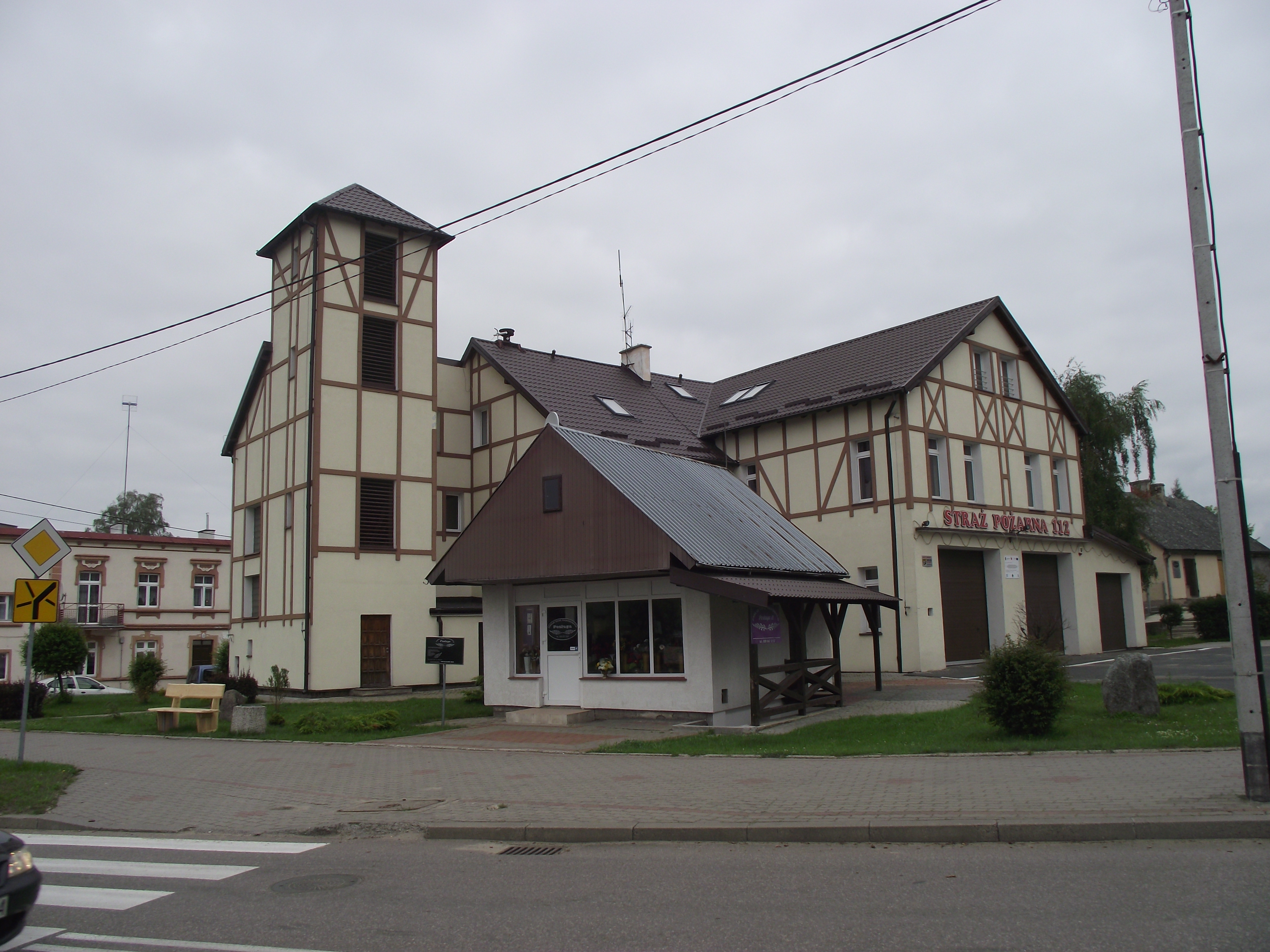 Miłomłyn - budynek straży pożarnej